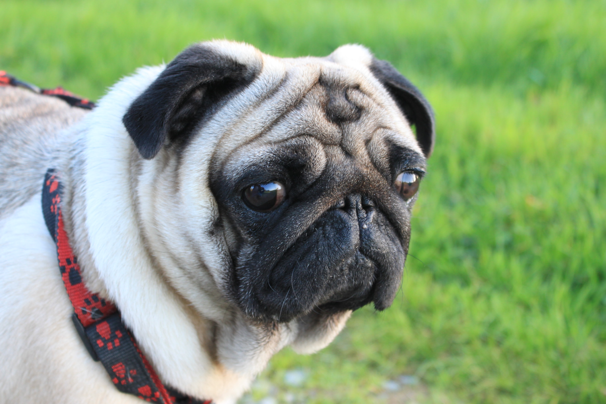 Un carlin